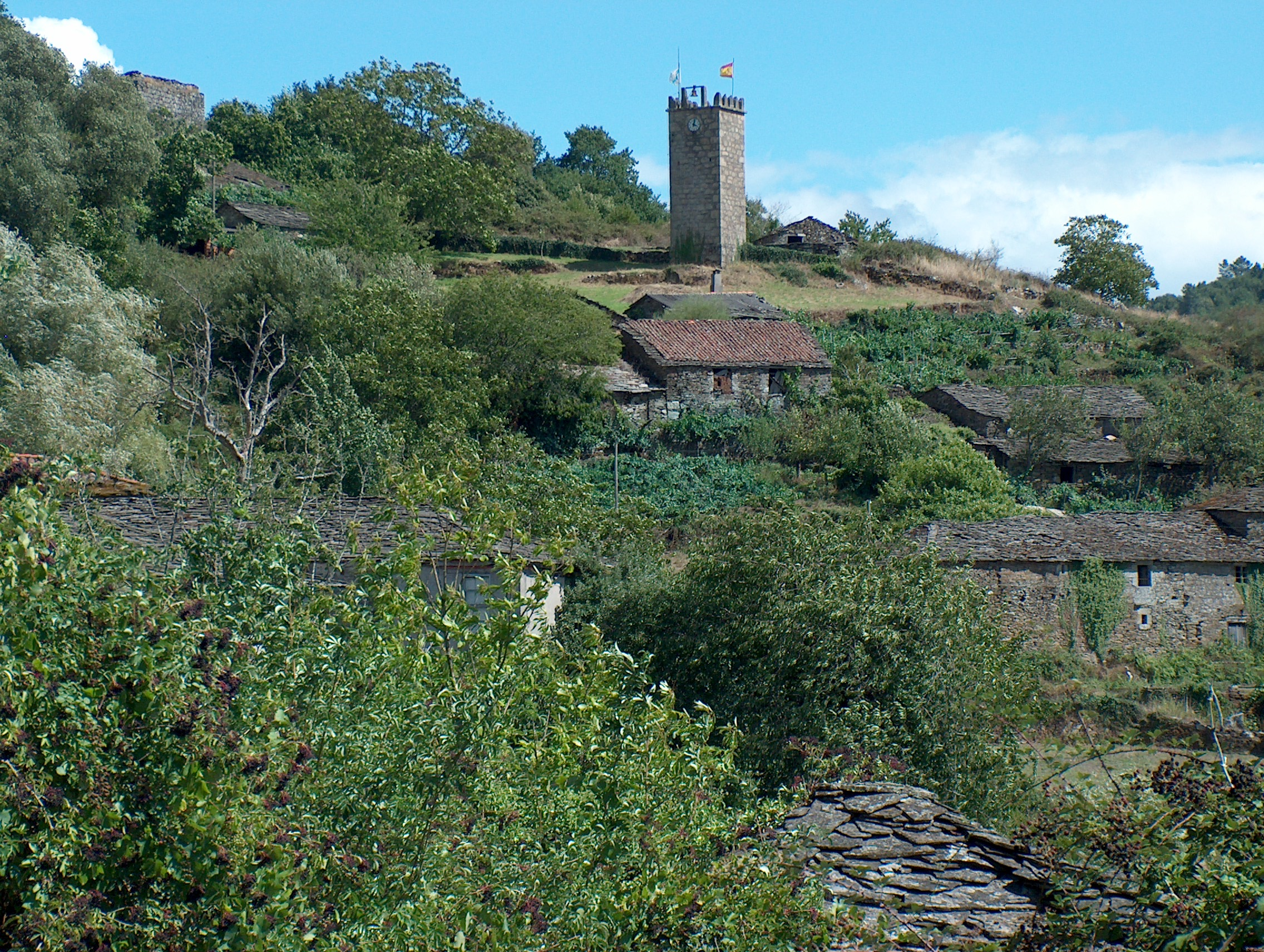 Torre do Reló, Marce, Pantón